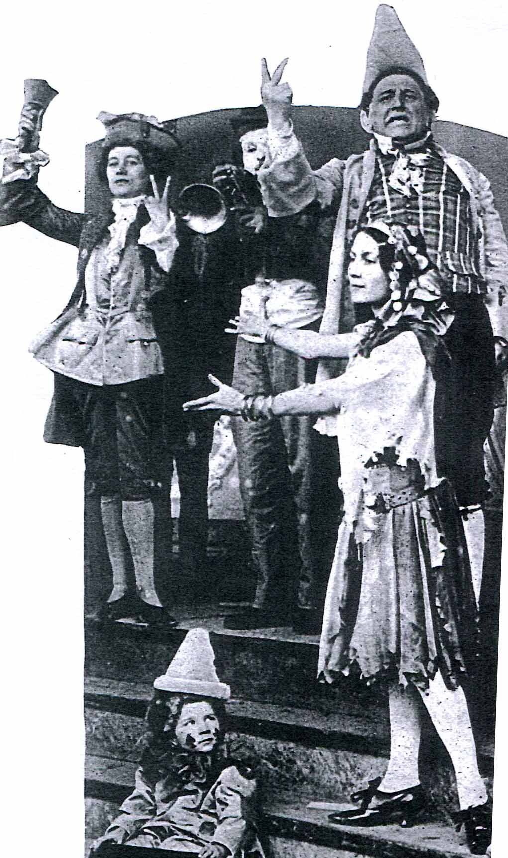 Stacia Napierkowska (a destra) ne La fille du saltimbanque, suo secondo film - produz 1908 Pathé Frères